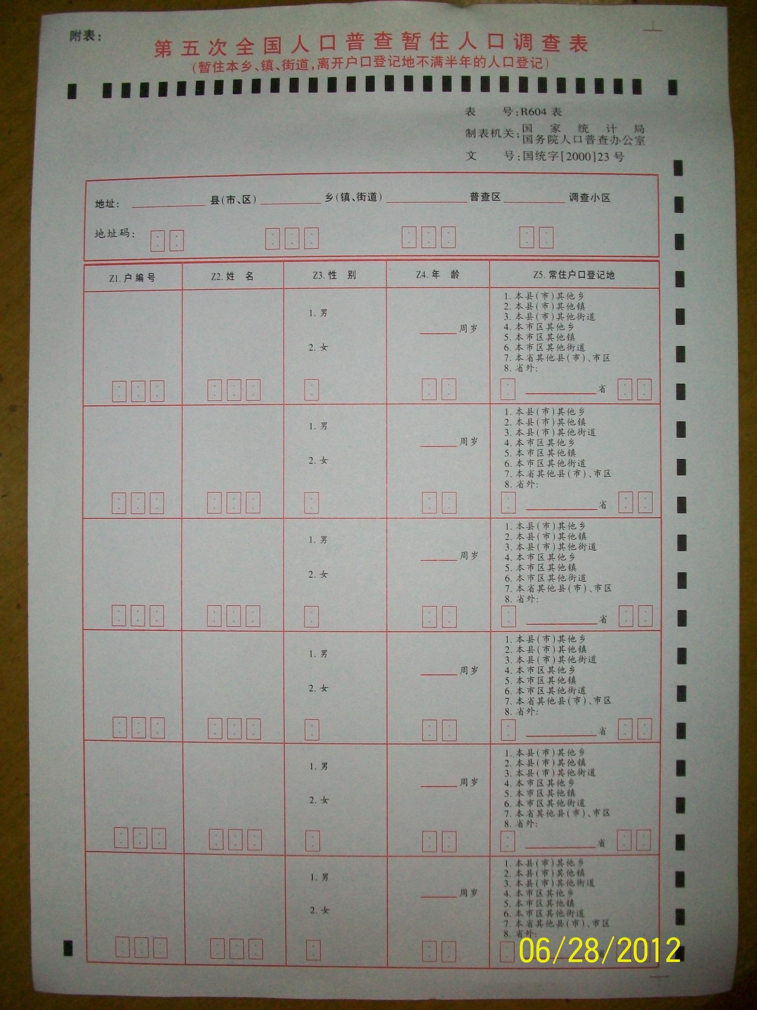 第五次全国人口普查暂住人口表